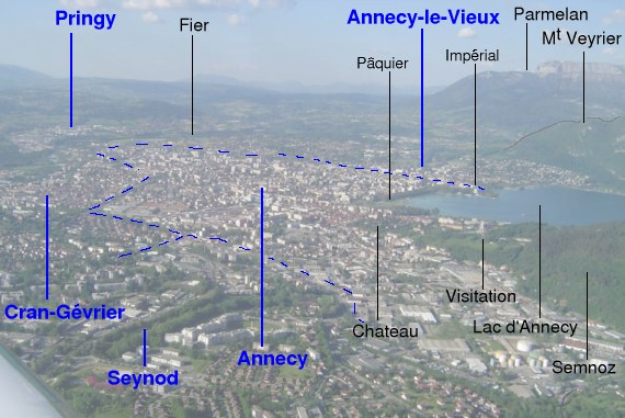 Vue aérienne d'Annecy - Annecy-le-Vieux légendée.